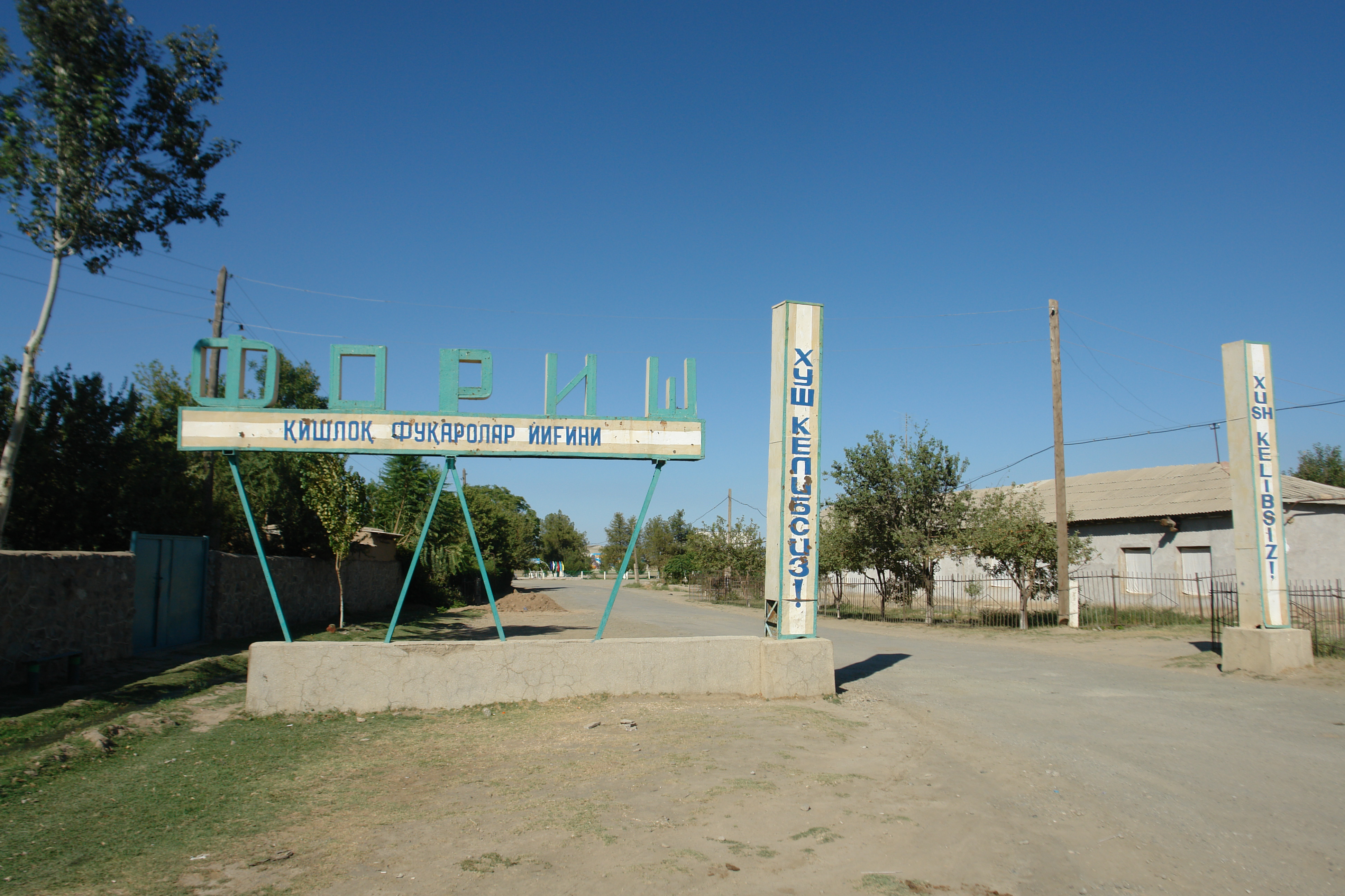 Въезд в Новый Кишлак, Фарижский район, Узбекистан